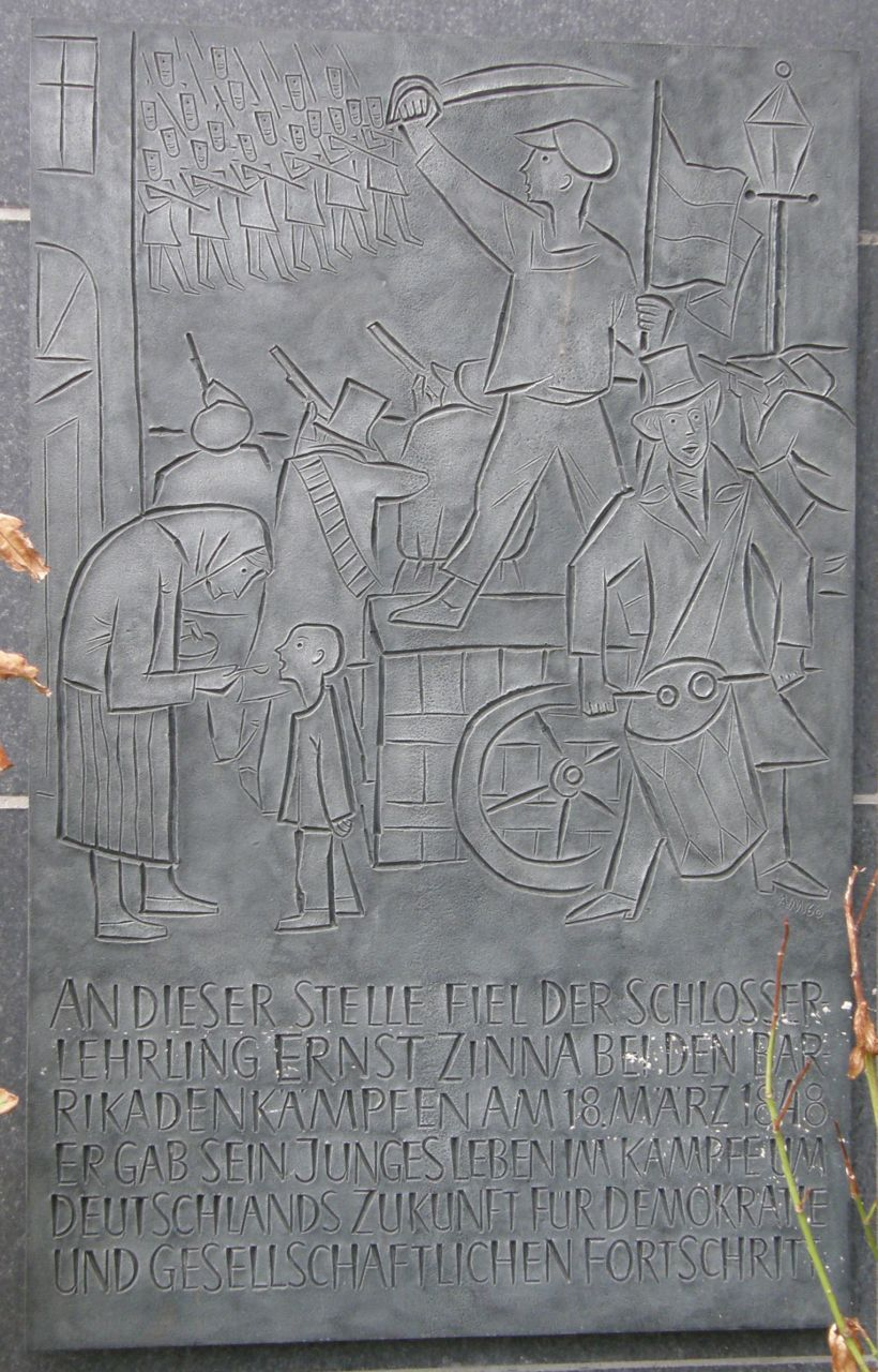 Gedenktafel für Ernst Zinna. Gestaltet von Arno Mohr. Jägerstraße 63c, Berlin-Mitte. Enthüllt 1968.